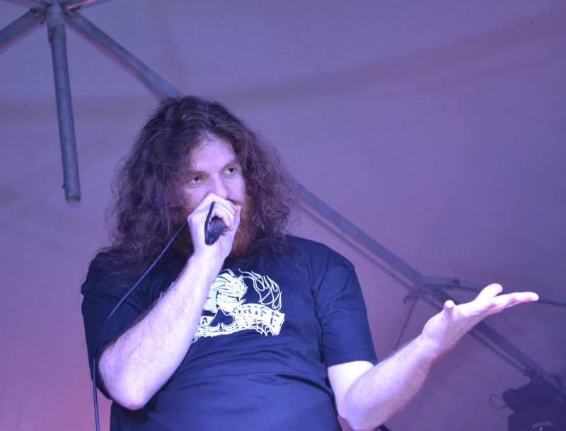 Jimmy em Laguna/SC no Festival Agosto Negro 2013